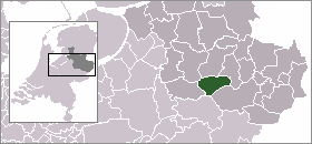 Location of Rijssen-Holten